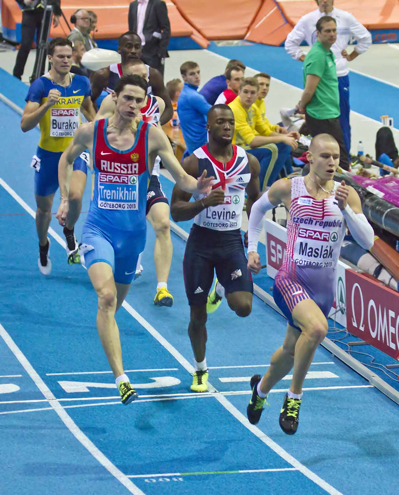 9064 finale 400m